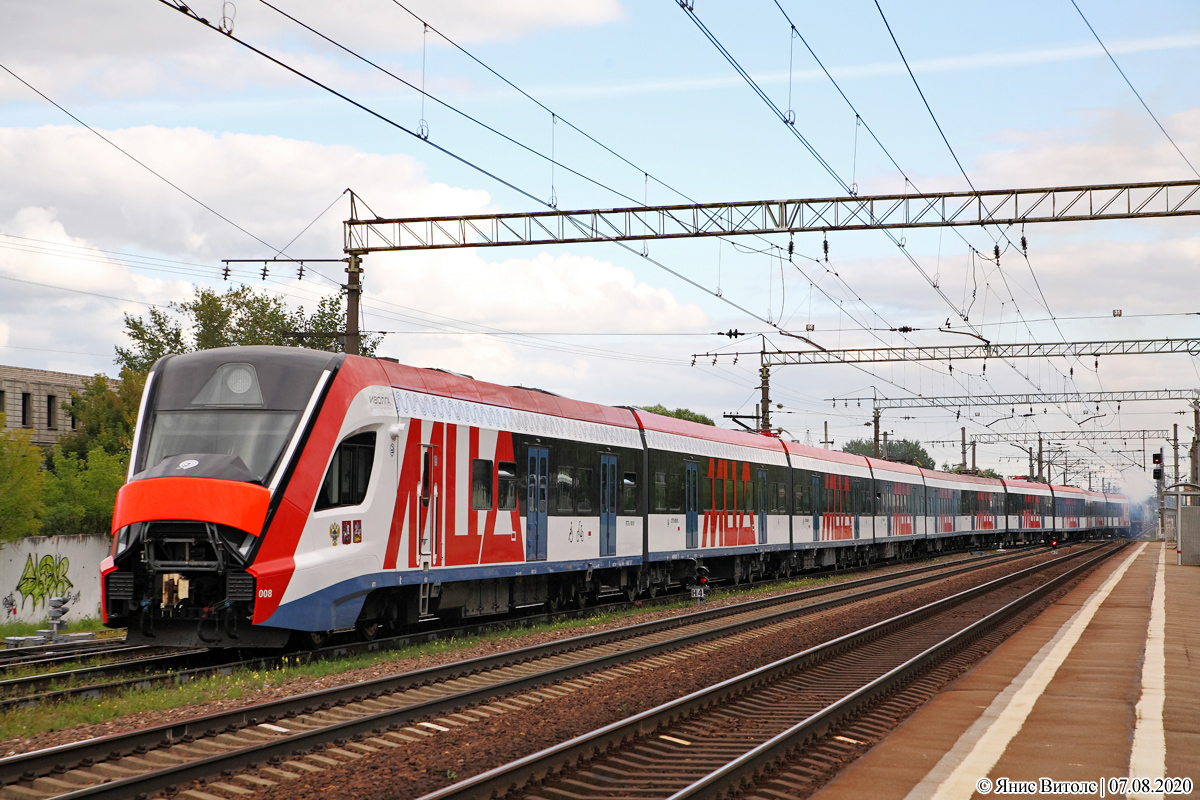 Электропоезд ЭГ2Тв-008 в дополненной 11-вагонной составности после установки новых буферных фонарей с открытым носовым обтекателем.Россия, Тверская область, станция Дорошиха